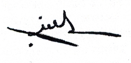 Autógrafo impresso de Cláudio de Jesus Ximenes, jurista de Timor Leste.